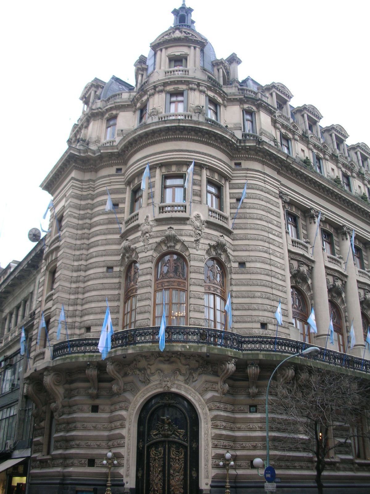 Centro Naval de la Argentina. Florida y Córdoba, esquina noreste, Buenos Aires, Argentina.